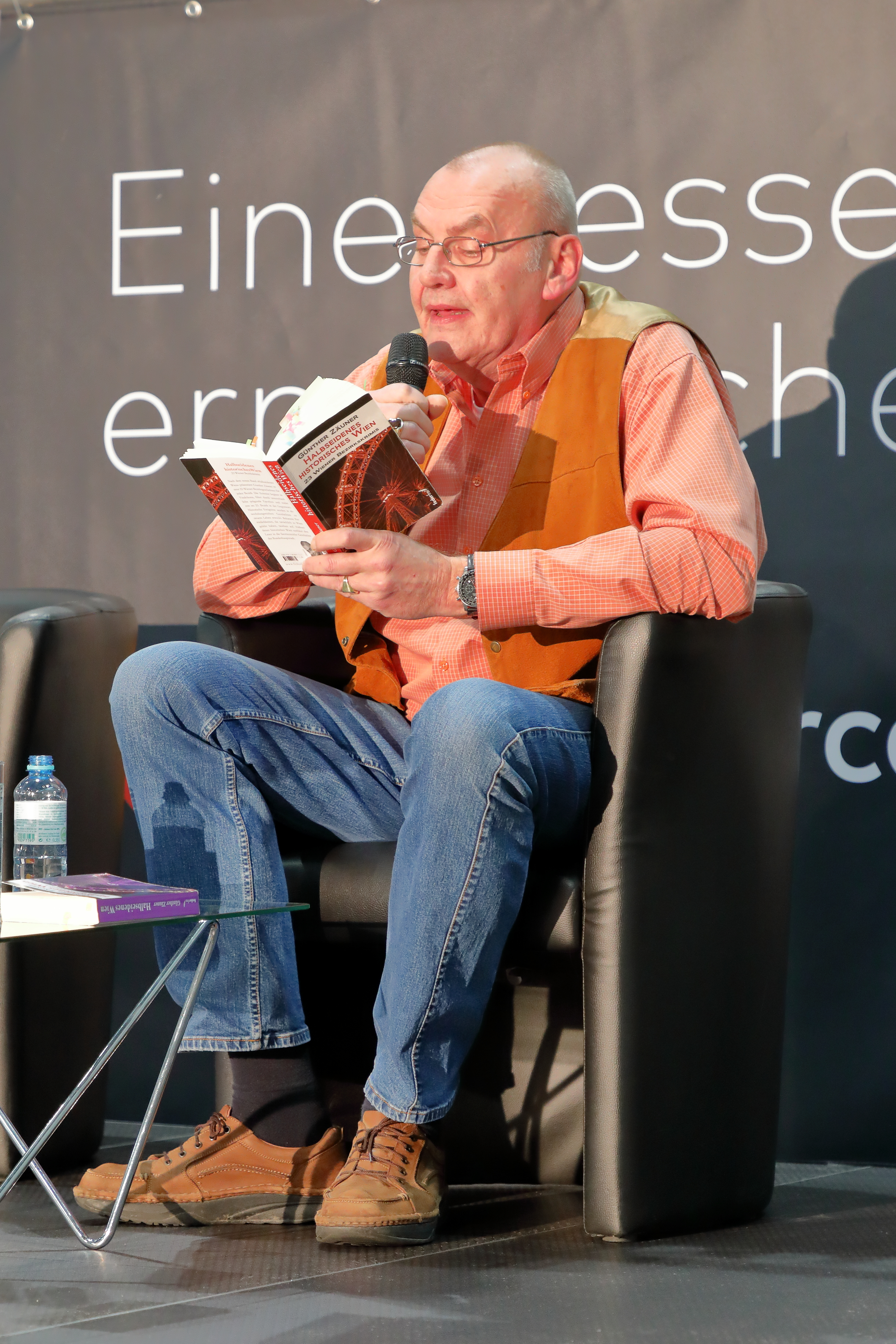 Der Schriftsteller Günther Zäuner bei der Präsentation seines Buches Halbseidenes historisches Wien auf der Wiener Buchmesse 2017.